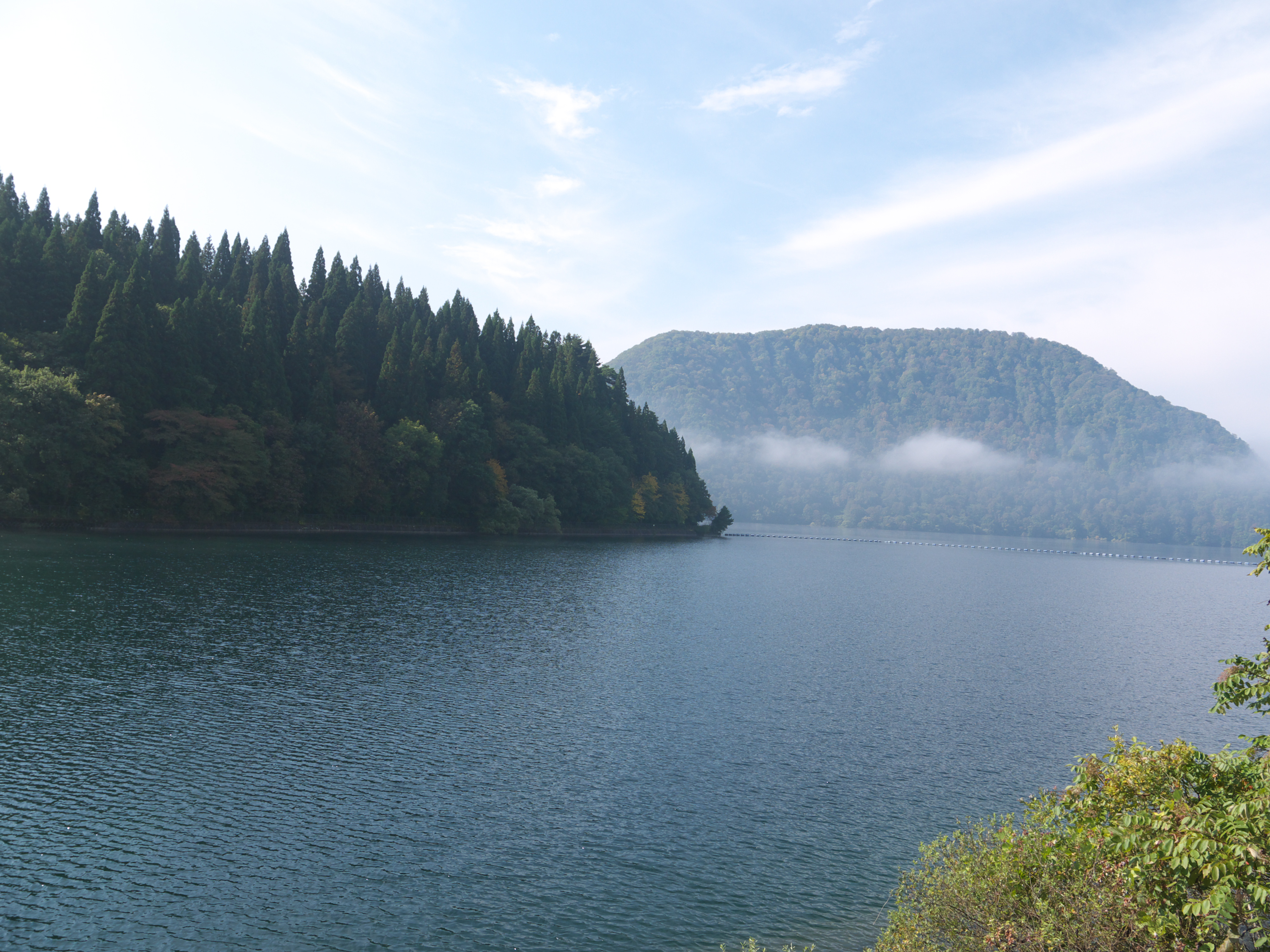 沼沢湖. キャンプ場から見た沼沢湖, 沼沢湖